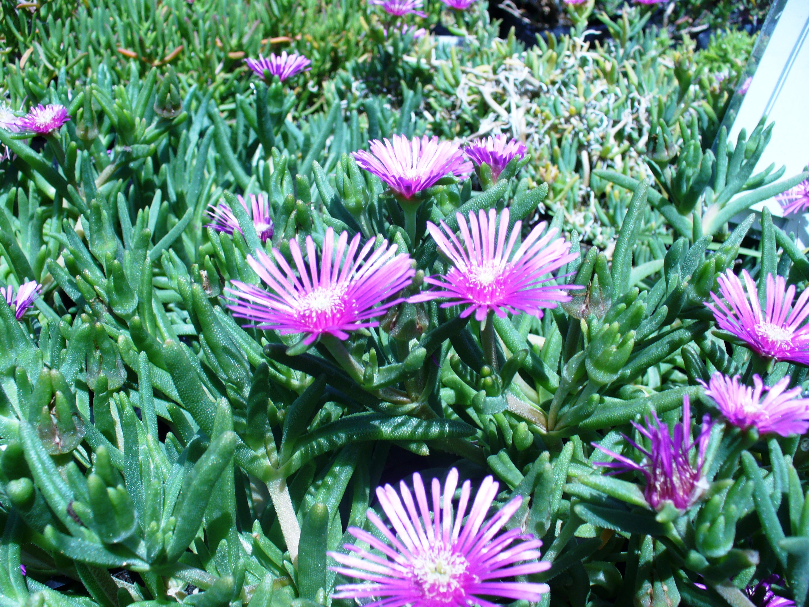 Delopsperma lydenburgense plant